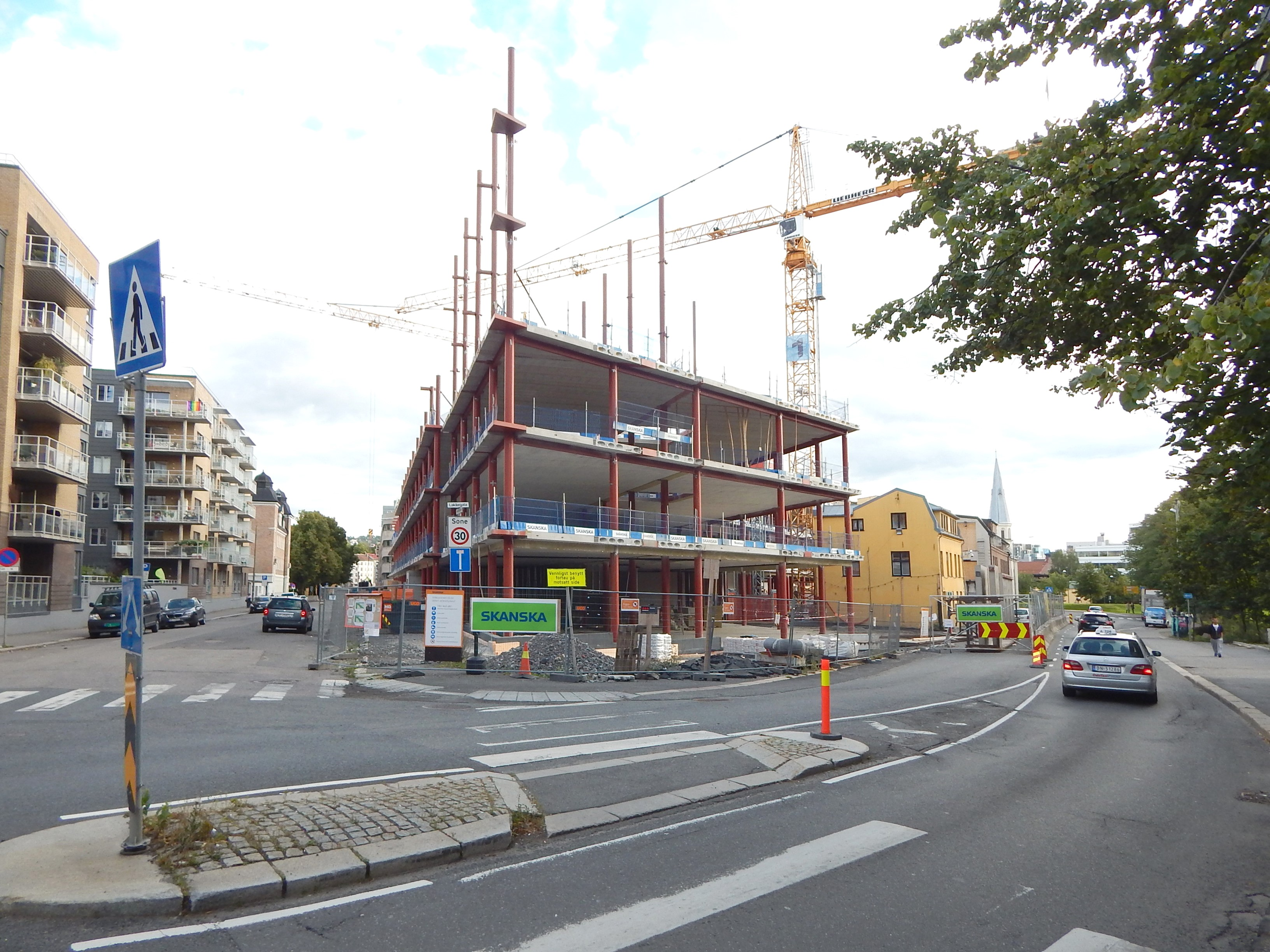 W.A. Wexels' plass er per 2015 ingen egentlig plass.